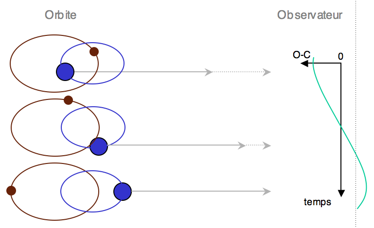 schéma d'une binaire à temps de trajet de lumière - light-travel time binary